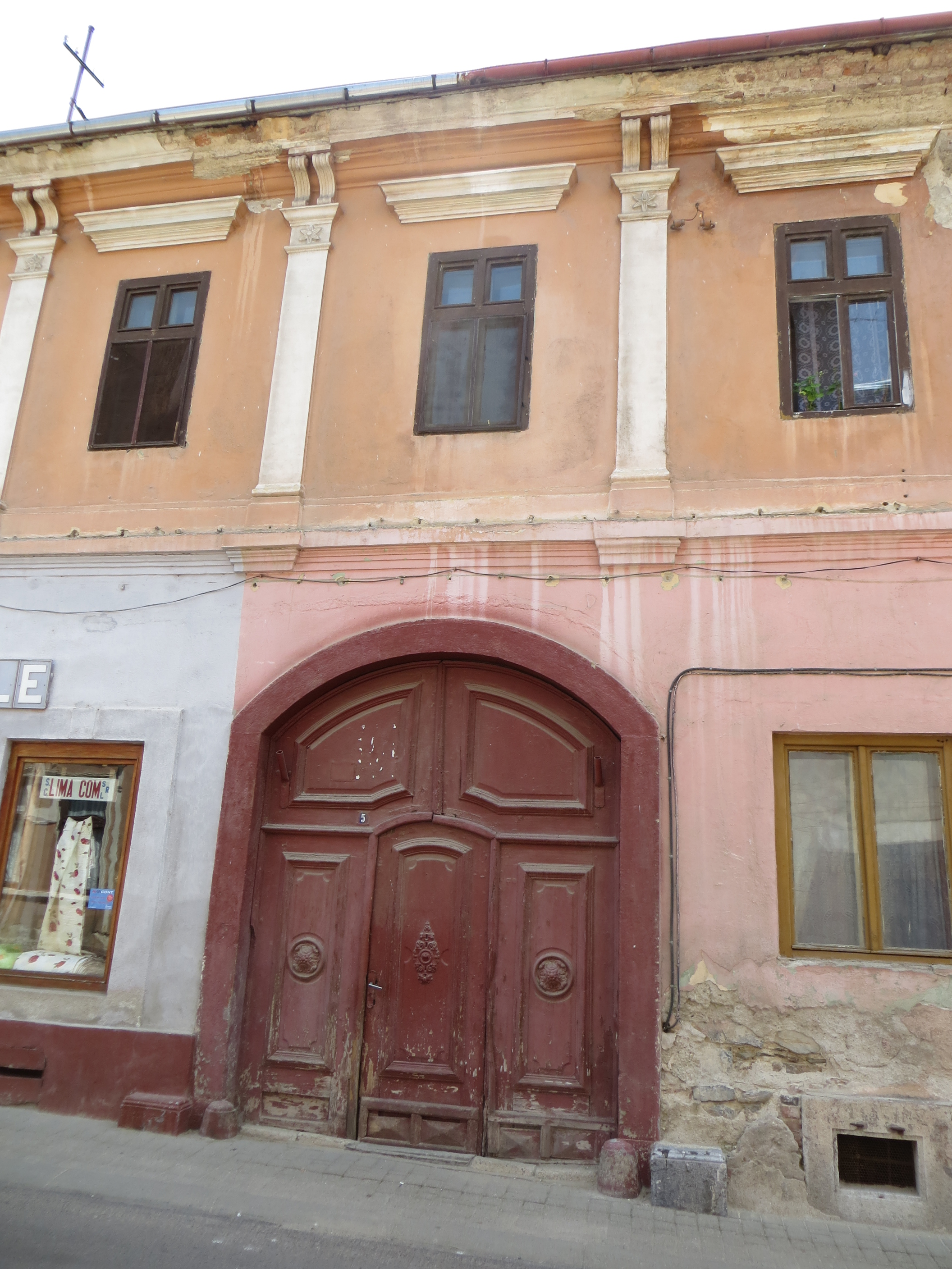 Casă din Oravița, Str. 1 Decembrie 1918 nr. 5